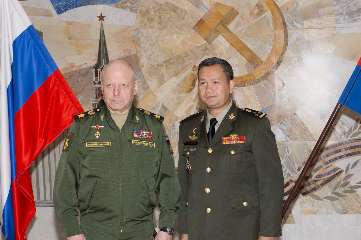 Встреча главнокомандующего Сухопутными войсками генерала армии Олега Салюкова с командующим сухопутными войсками Королевства Камбоджа генерал-лейтенантом Хун Манетом